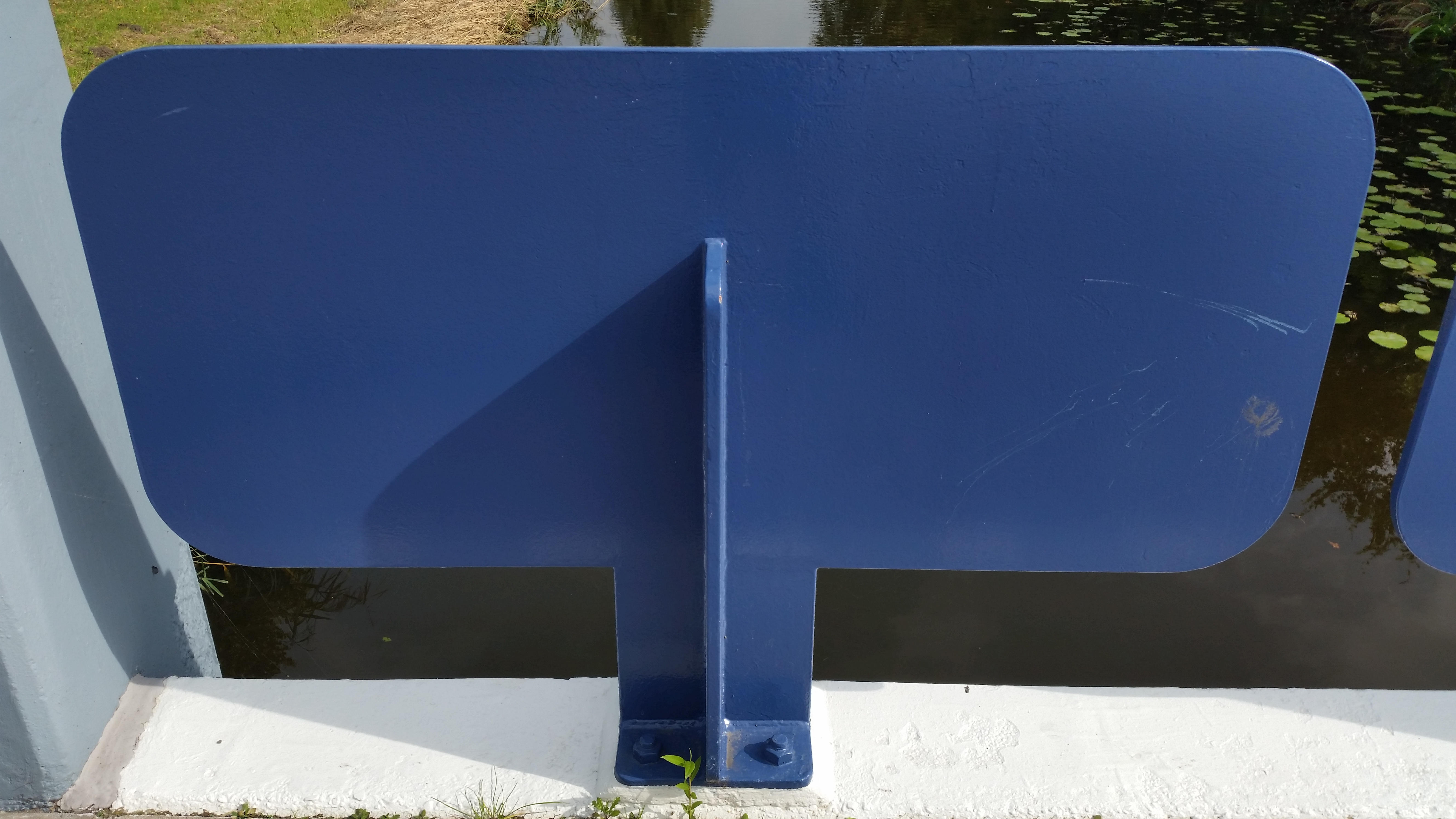 Brug 906 (in Amsterdam), detail van leuning/balustrade